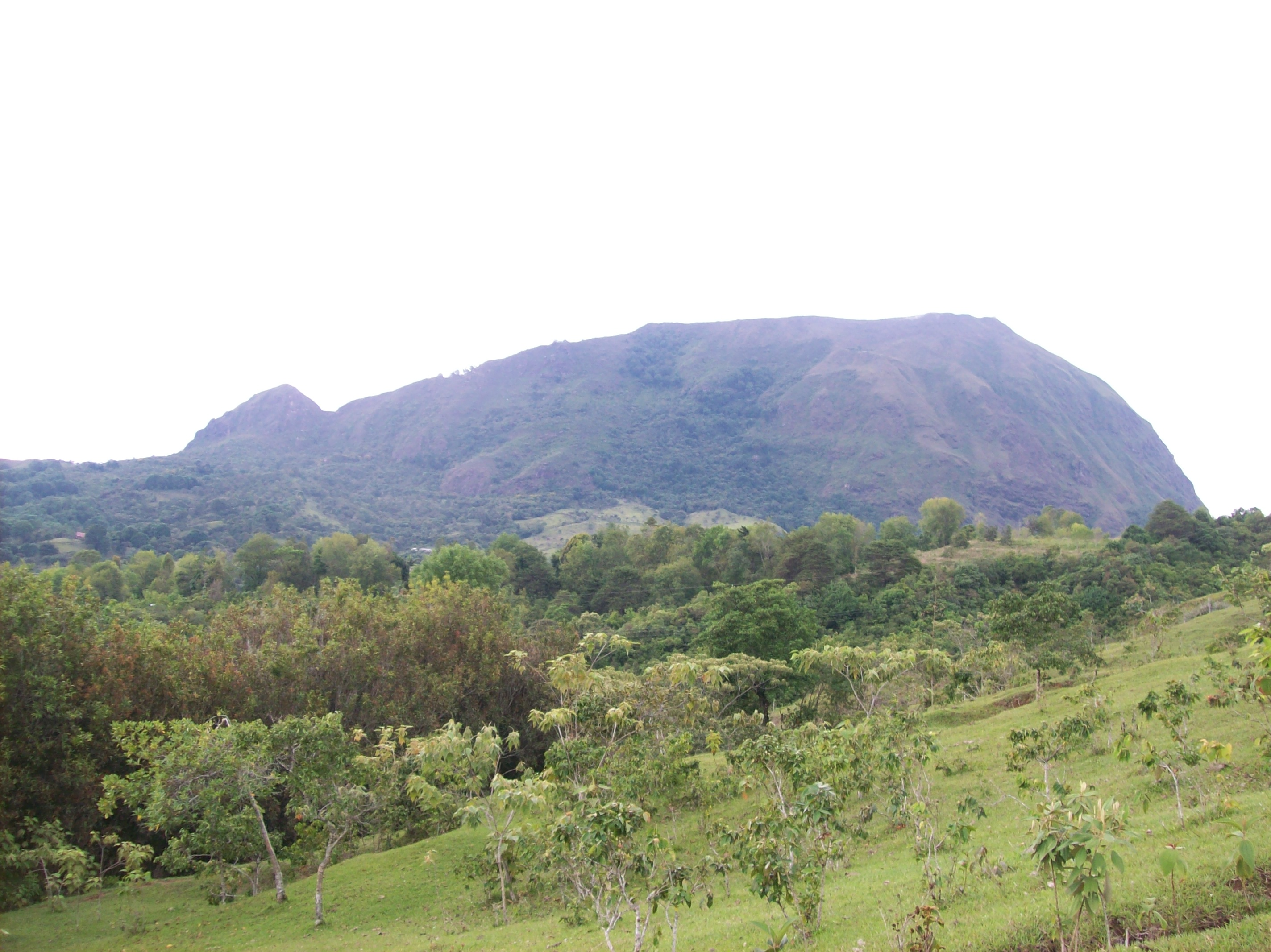 Cerro de Bolivar Cauca